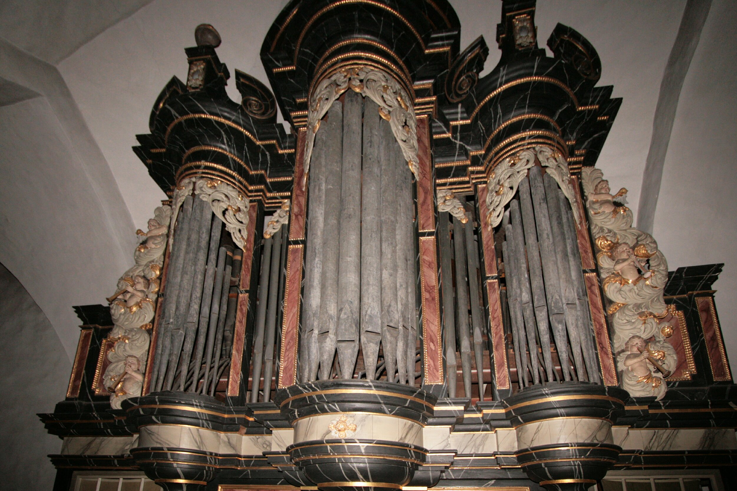 Old organ from 1701/2/Alte Orgel von 1701/2